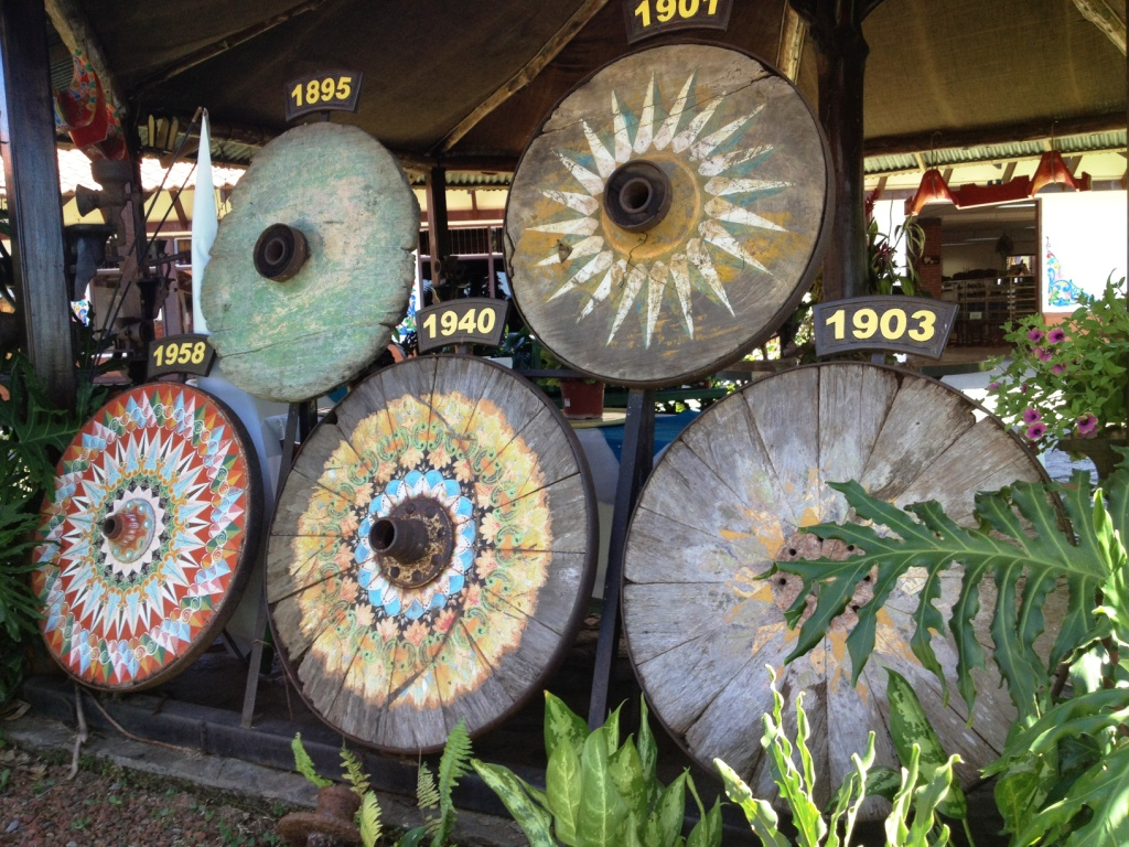 Las carretas como arte están íntimamente vinvuladas al café dentro de la "cultura del café" de Costa Rica y tienen una tradición que data de más de tres siglos.